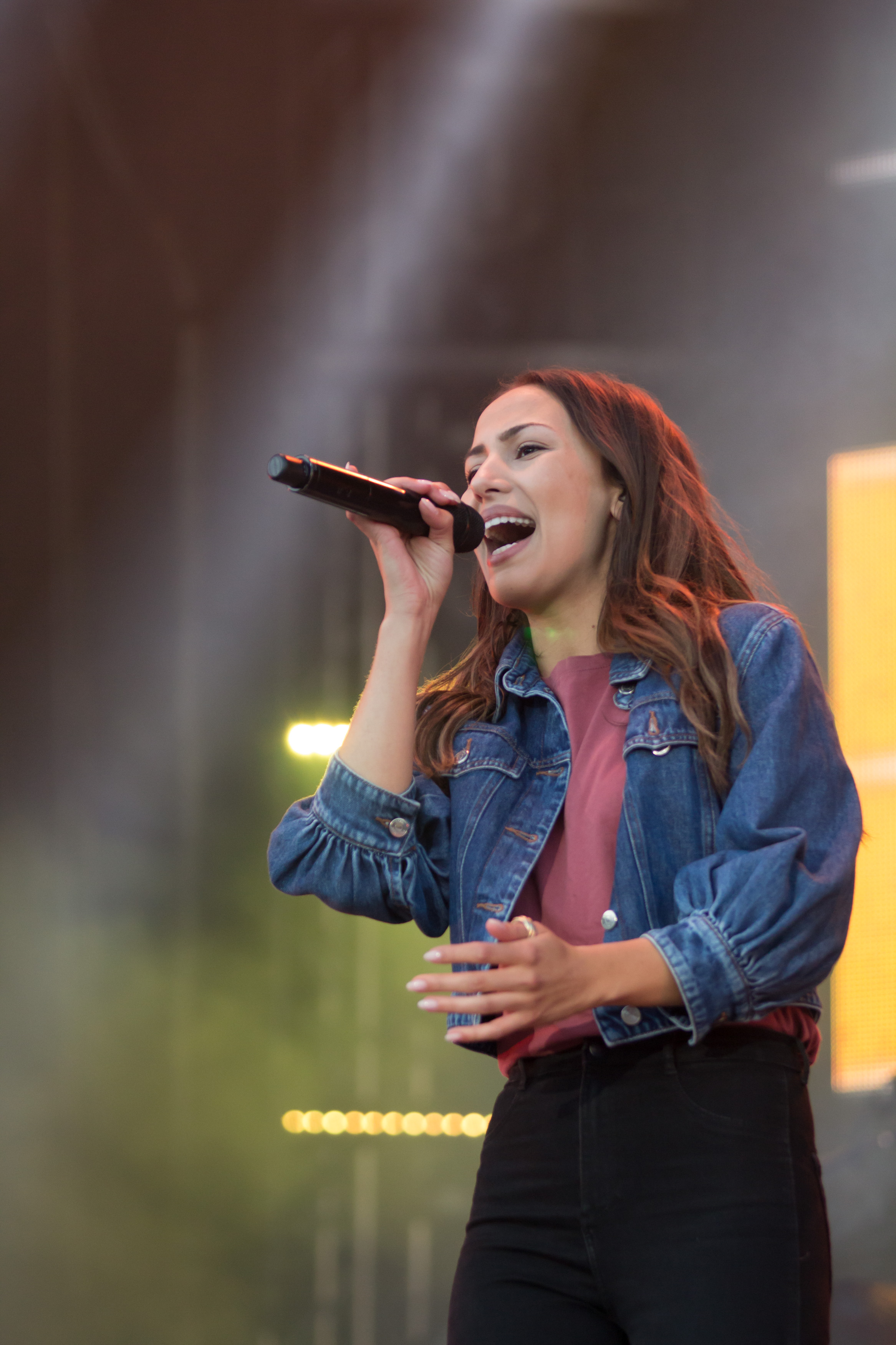 Auf der Kieler Woche 2018